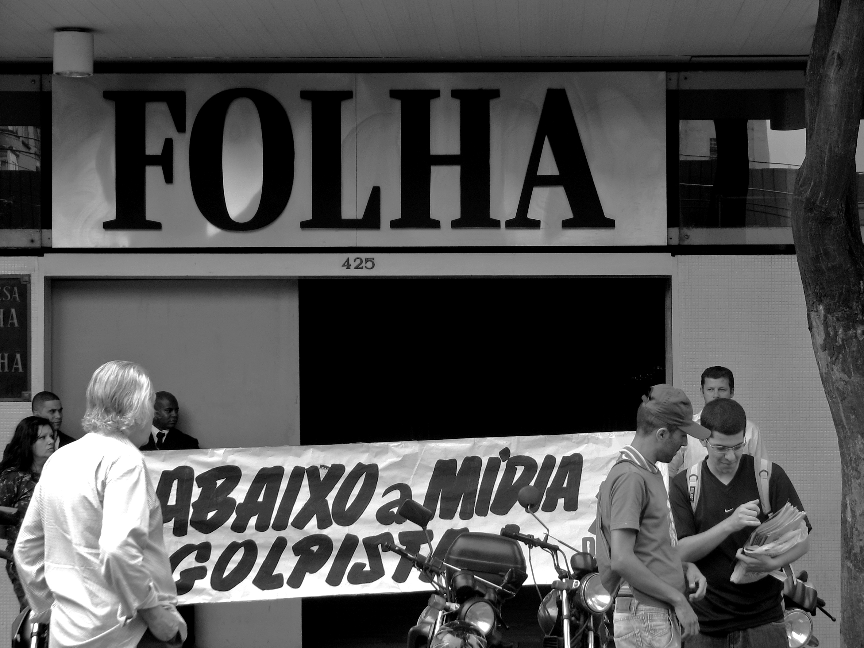 Protesto contra a "Folha de S. Paulo" (São Paulo, 2009). Foto: Gabriel Fernandes, cc-by-sa